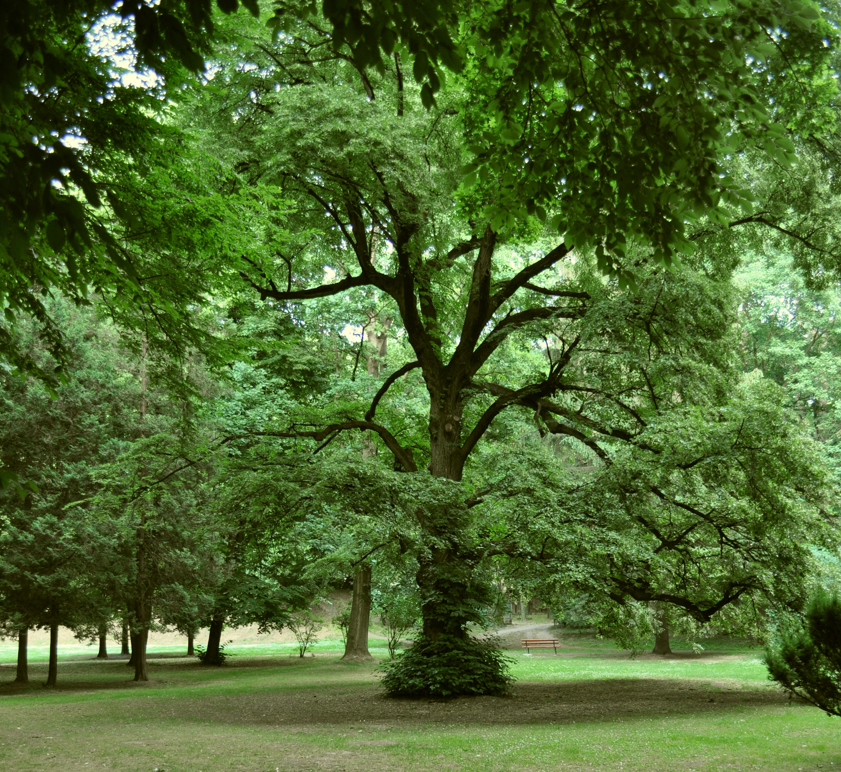 Przeworsk - park w zespole pałacowym Lubimirskich